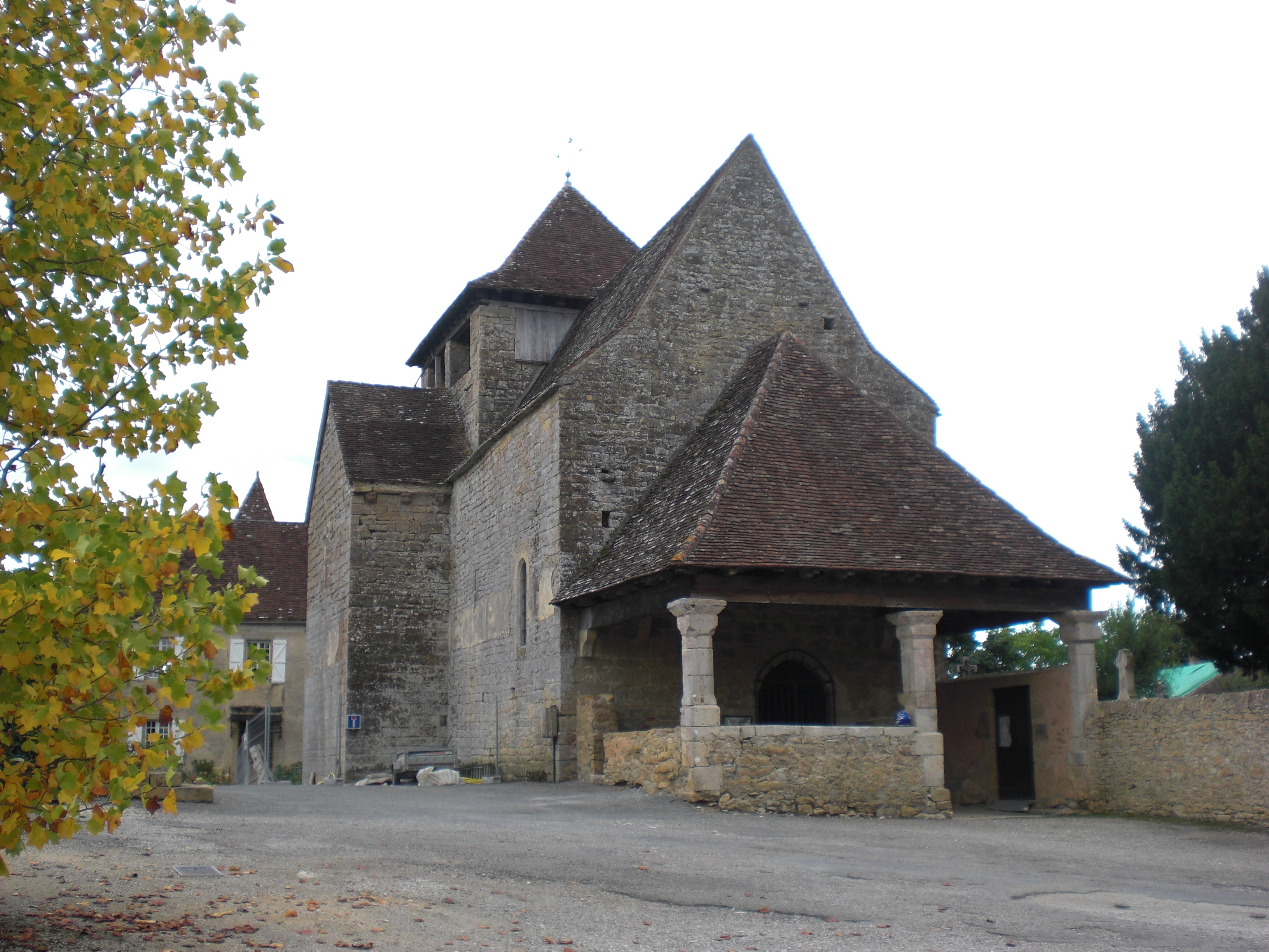 Église romane Saint-Jean-Baptiste, dans la ville de Saint-Jean-Lespinasse